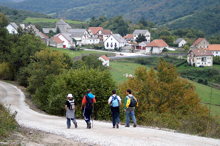 Aezkoako Orbara udalerria, Nafarroa.